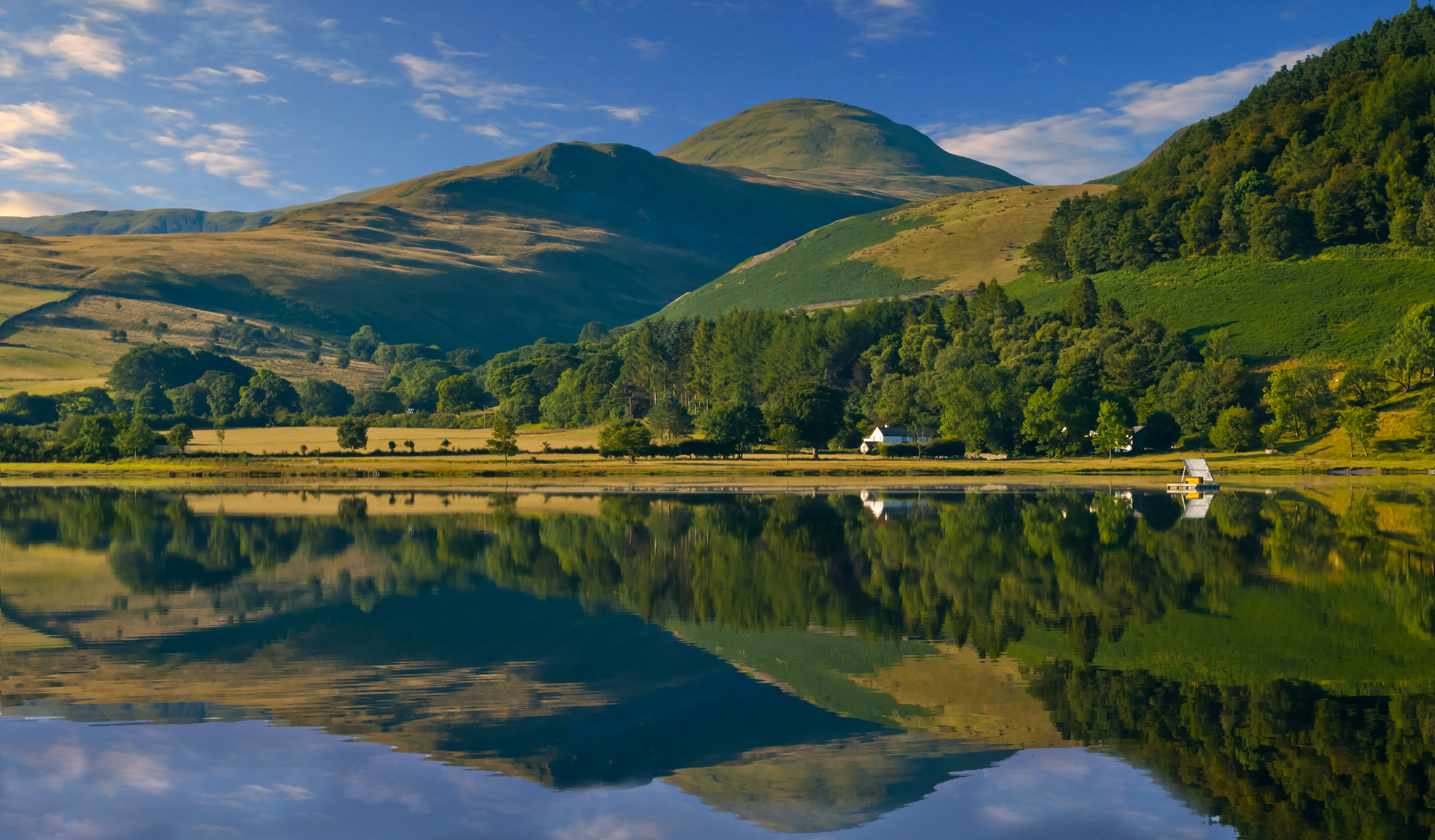 Loweswater